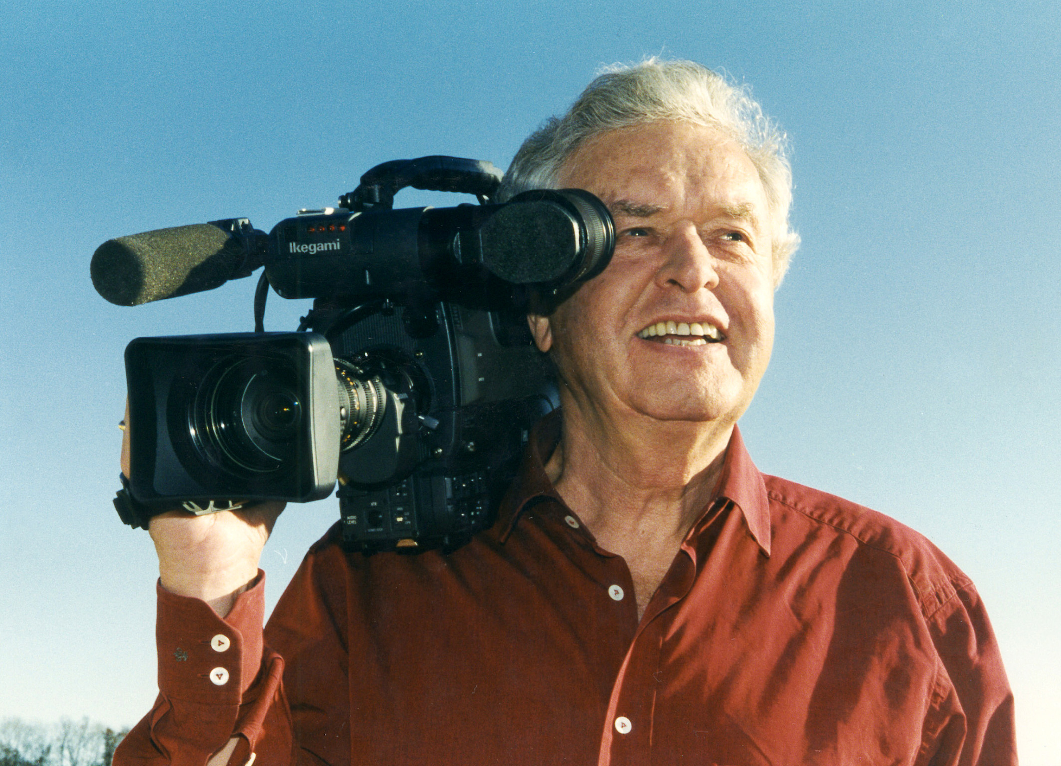 Prof. Ernst Waldemar Bauer (* 28. Februar 1926 in Tübingen, auch bekannt als Jean Rebau) ist ein deutscher Fernsehpublizist, Biologe, Buchautor und Dokumentarfilmer.